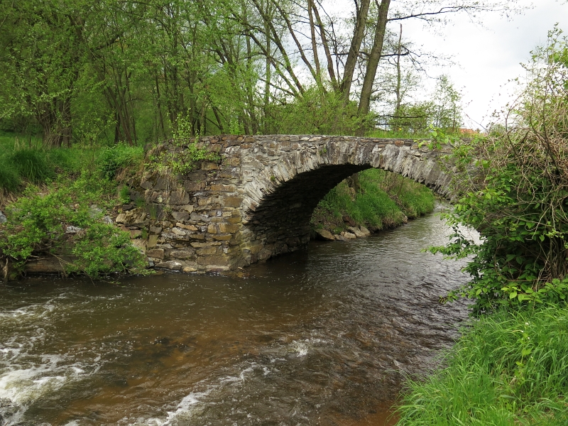 Silniční mostek, přes potok Polečnice, Kájov.